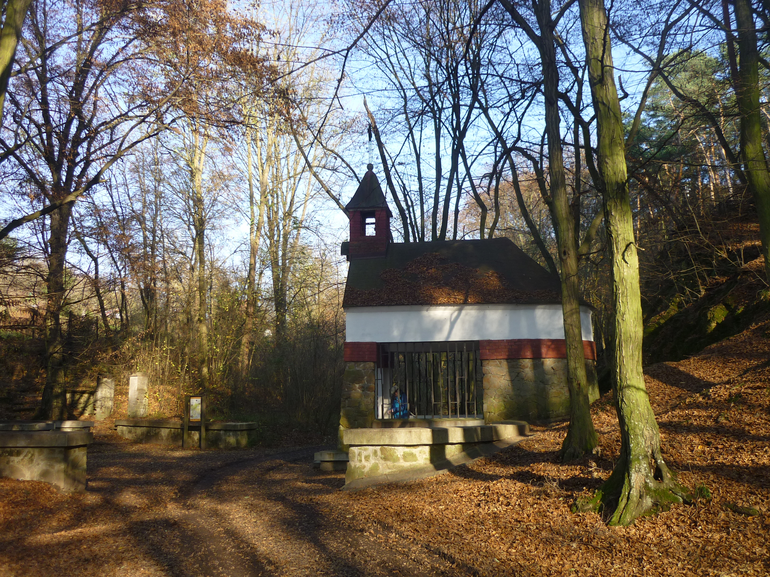 Brno-Sadová - Kaple sv. Antonína - pohled z jihu